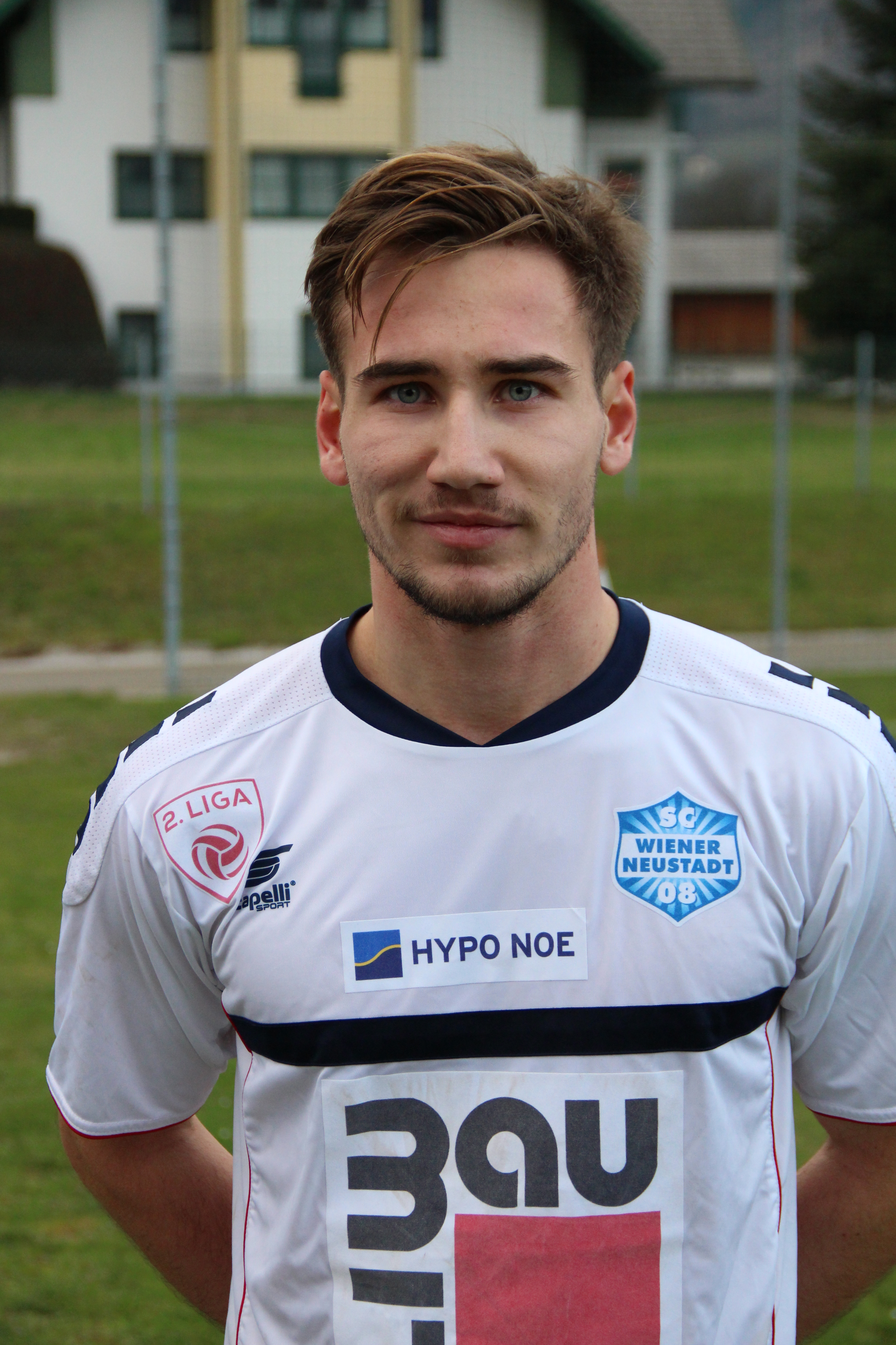 Simon Strauss (Testspieler SCWN)